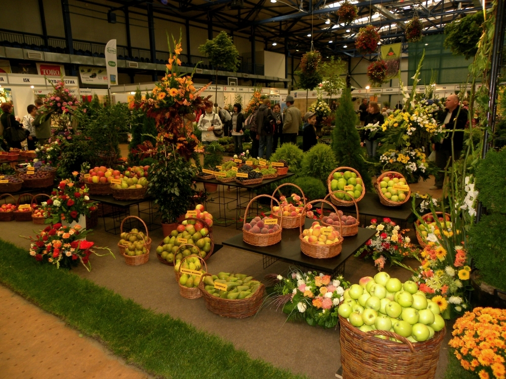 Święto Kwiatów 2010